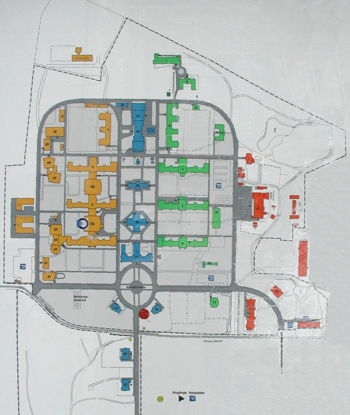 Situationsplan von 2008, bearbeitet